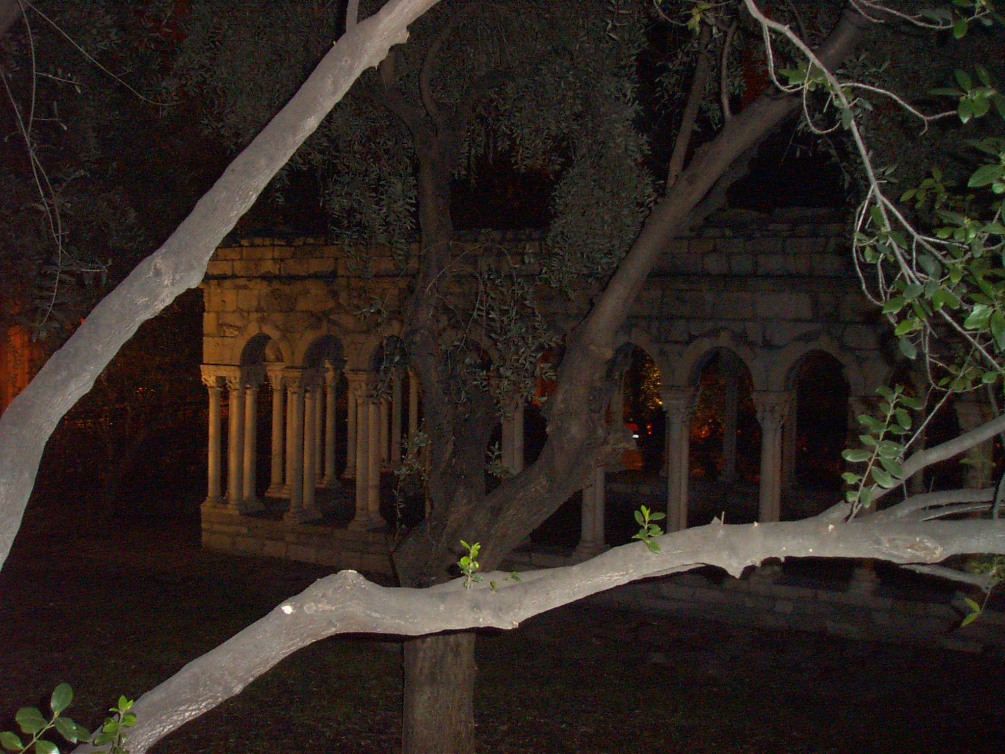 Chiostro del vecchio convento di S. Andrea a Genova